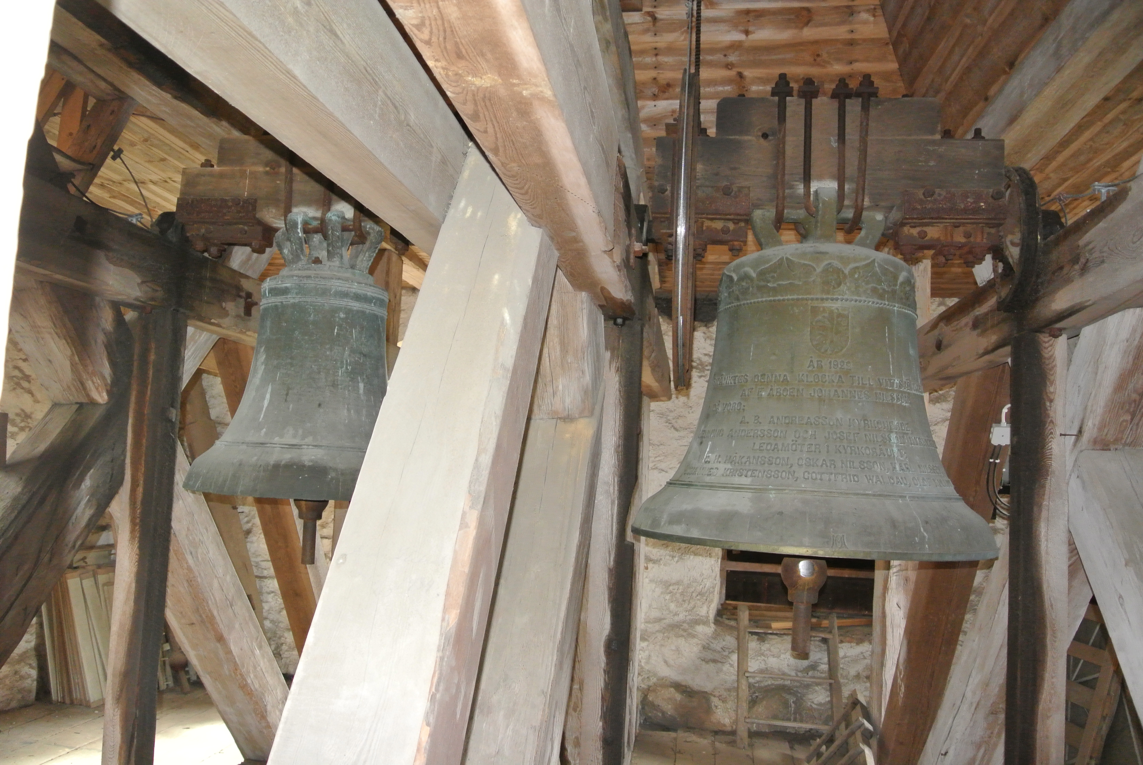 Vittsjö kyrkas klockor. Storklockan är gjuten av M E Ohlsson i Ystad år 1924 och den lilla är gjuten på tidigt 1500-tal